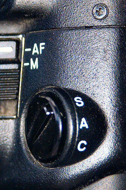 Minolta Dynax 9 - Umschalter für AF-Modi